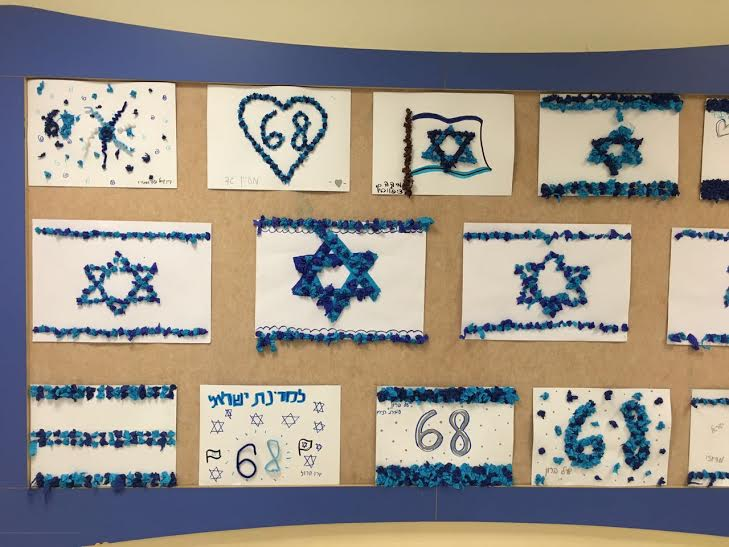 יומולדת ה-68 של מדינת ישראל